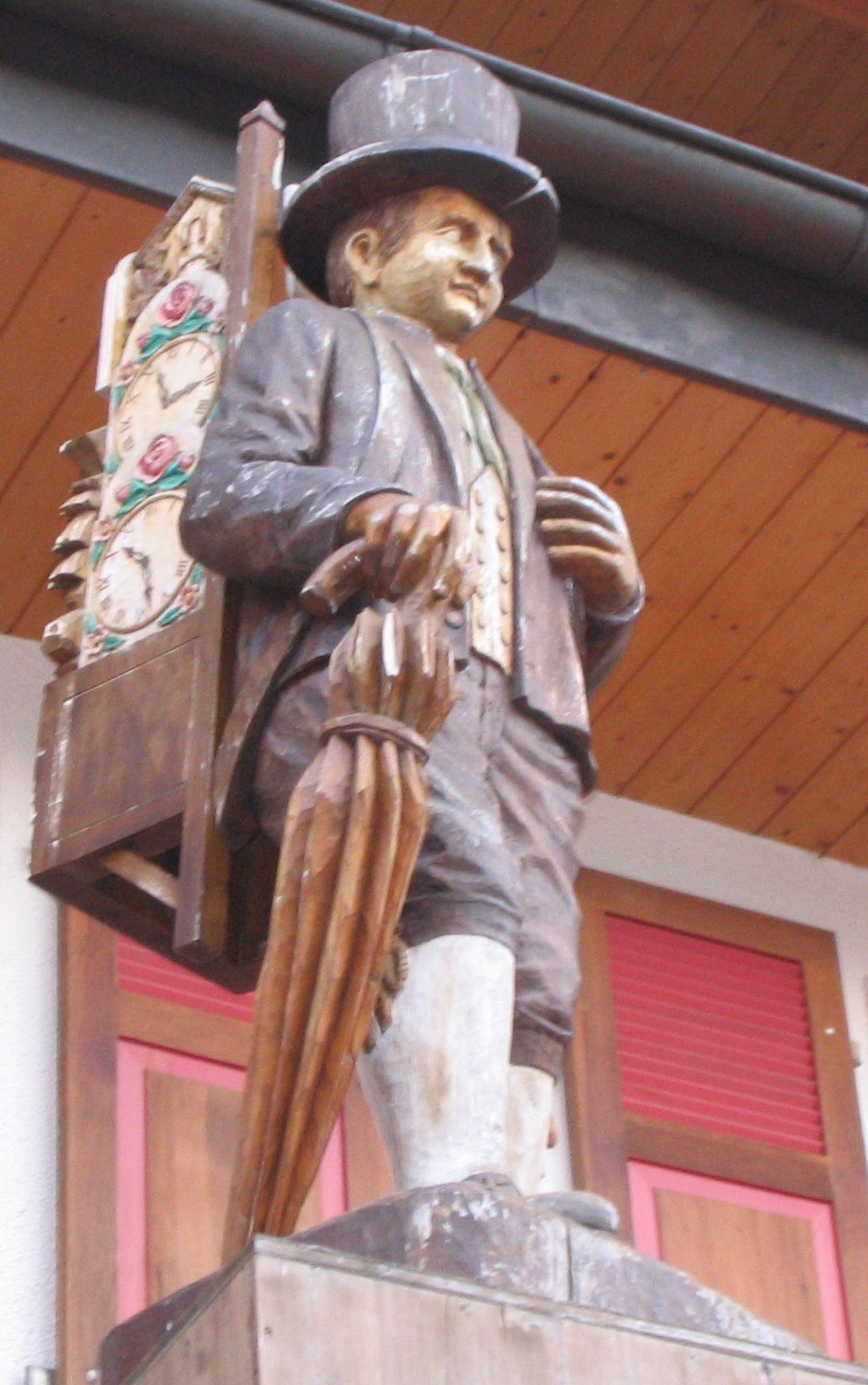 Holzfigur eines Uhrenträgers aus dem Schwarzwald